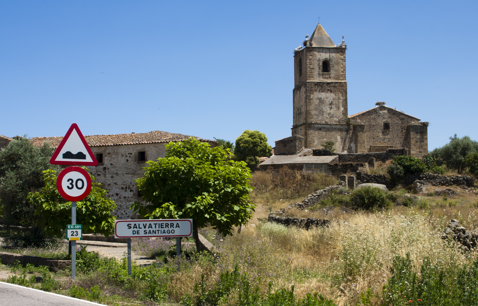 Entrada al pueblo